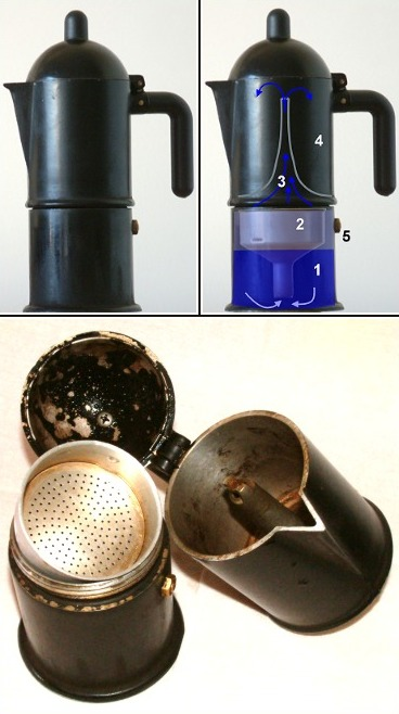 Funktion einer Espressokanne.